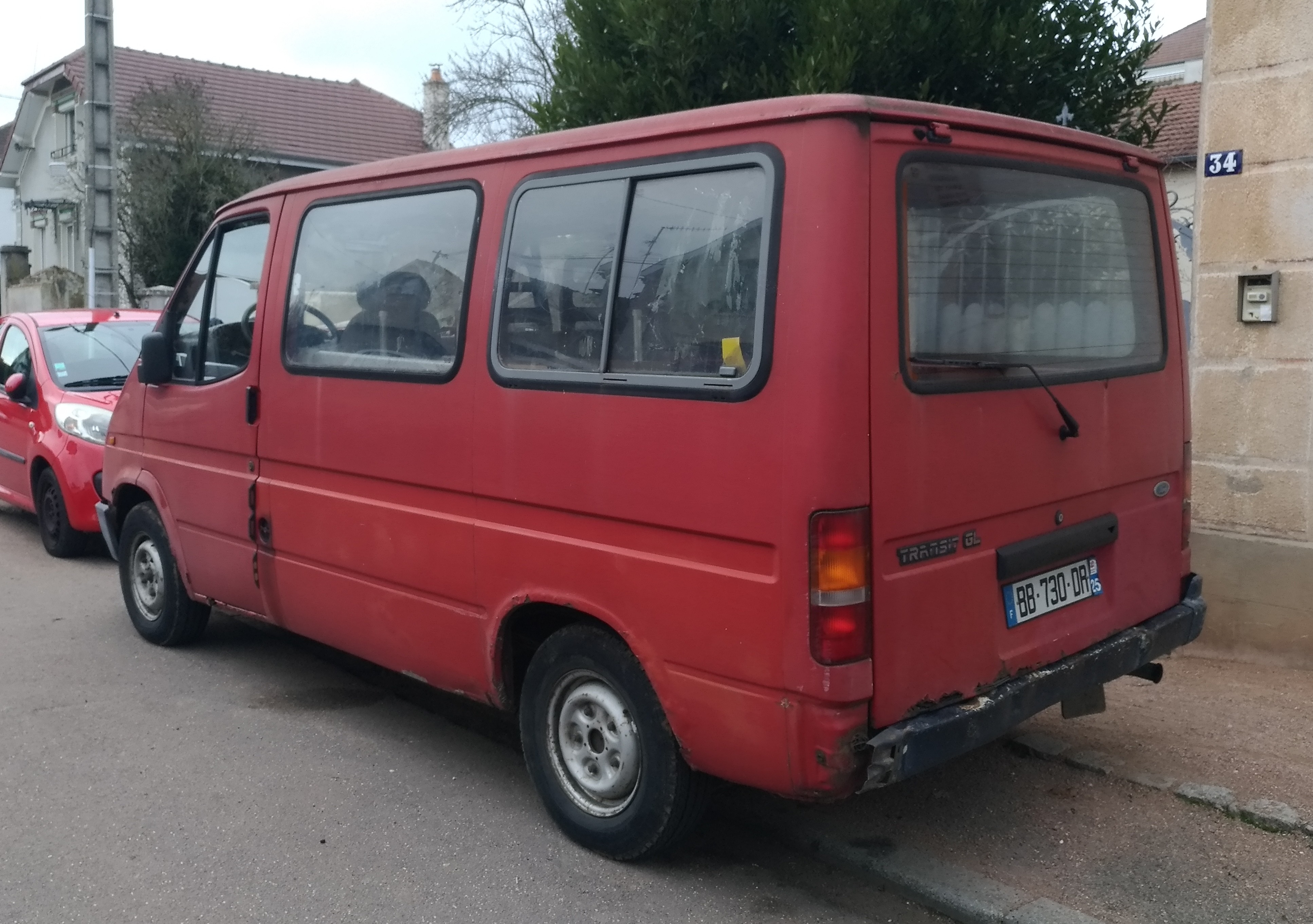 1989 Ford Transit (2.5 D 68 hp) at Dijon